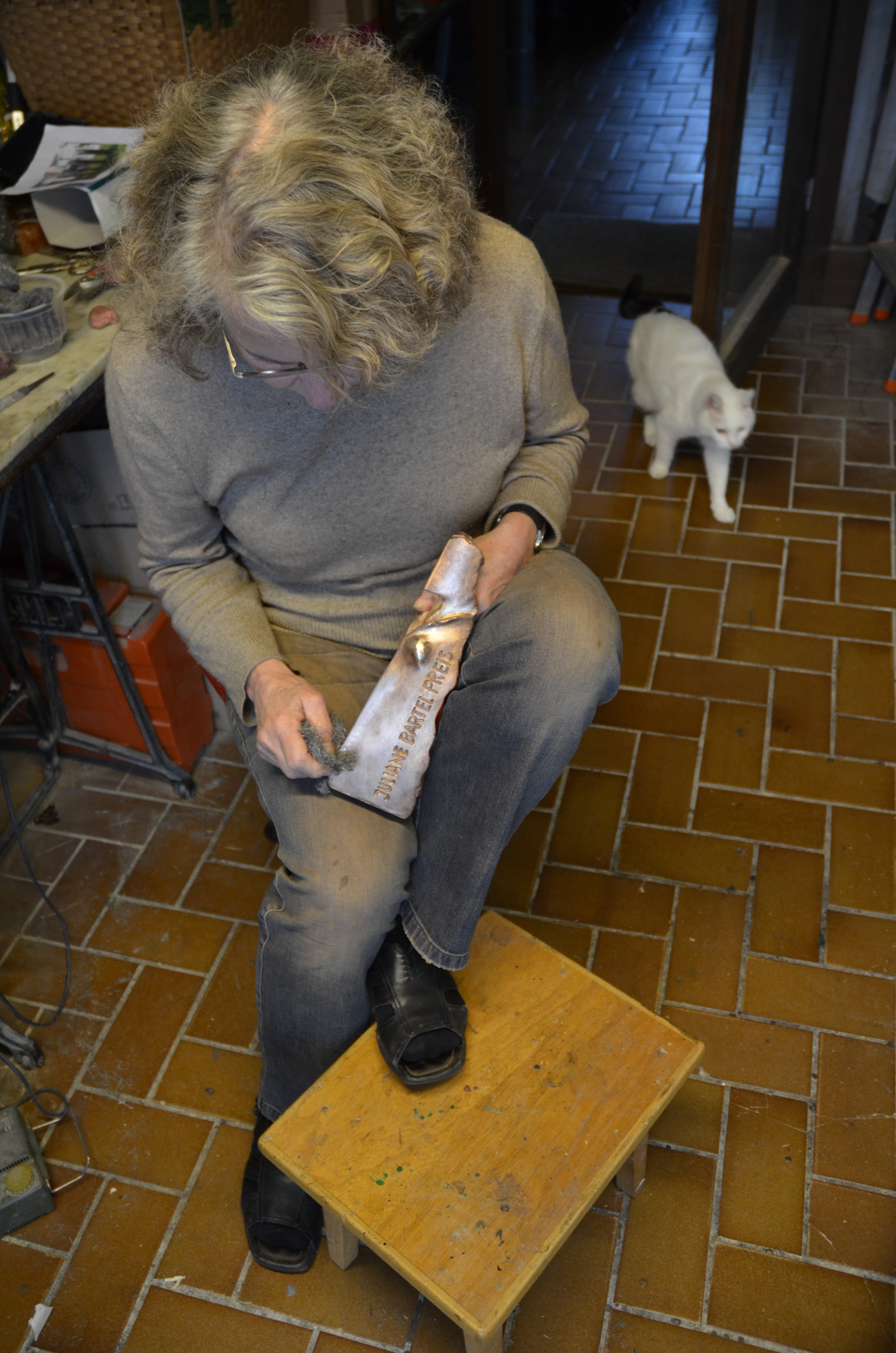 Die Bildhauerin Ulrike Enders am 3. Oktober 2018 in ihrem Atelier in der Beekestraße 76 in Hannover-Ricklingen während der Bearbeitung der von ihr gestalteten Skulptur zur Verleihung des Juliane-Bartel-Preises ...